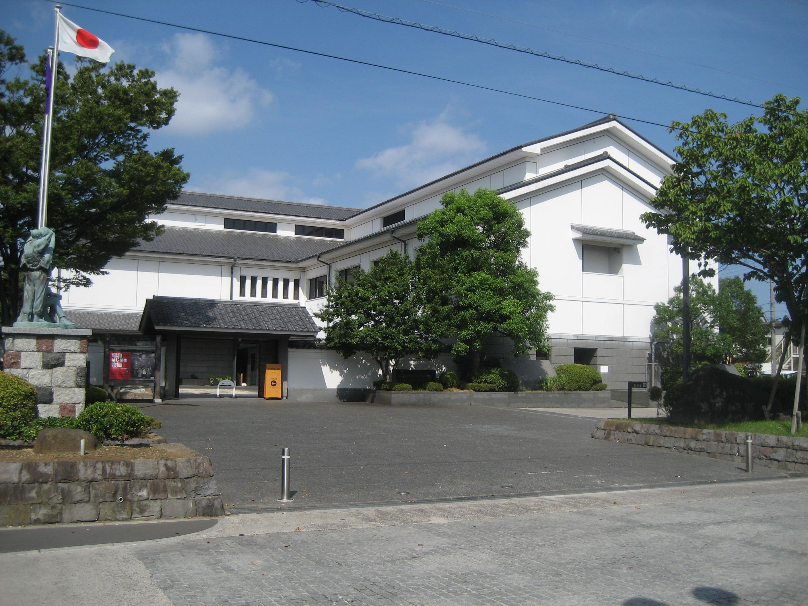 足立区立郷土博物館（正面付近を撮影）